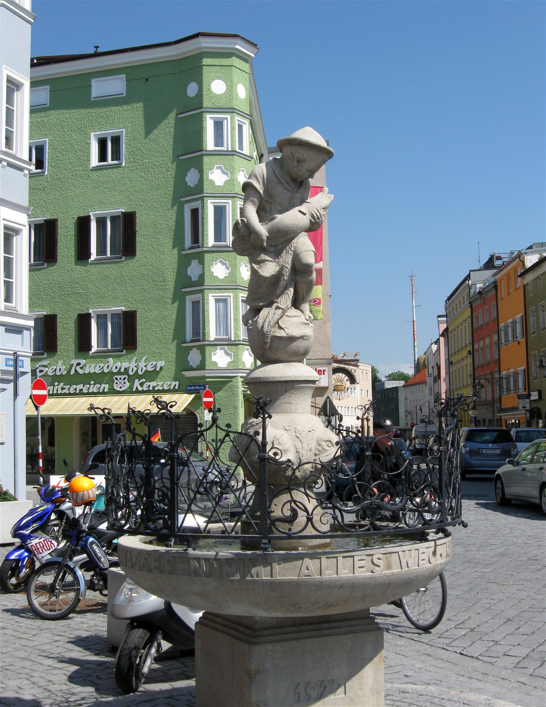 Ludwigsplatz; Fischbrunnen, mit Figur und Schmiedeeisengitter, bez. 1927, vor Haus Nr. 23